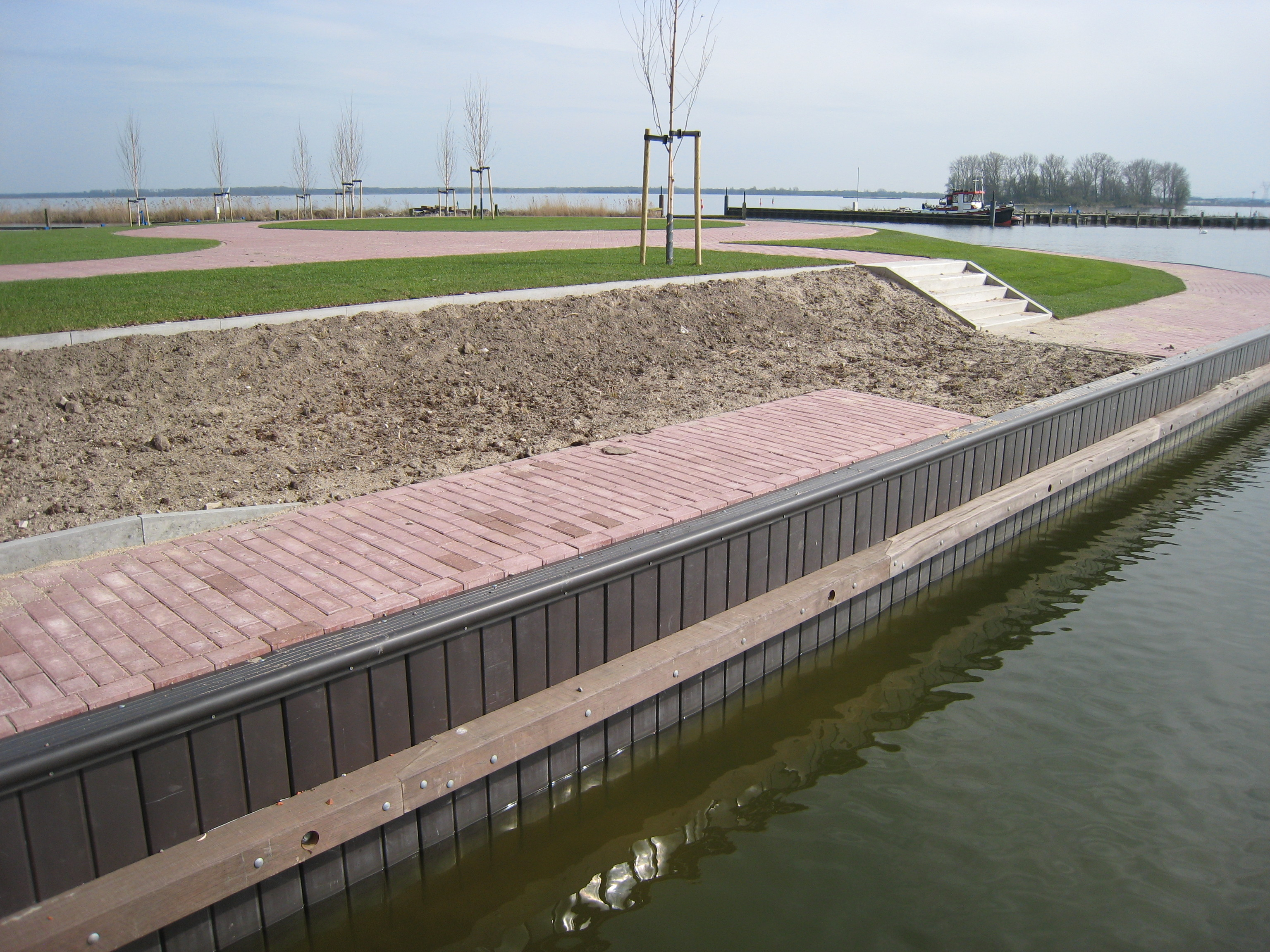 Kunststof beschoeiing toegepast in Biddinghuizen